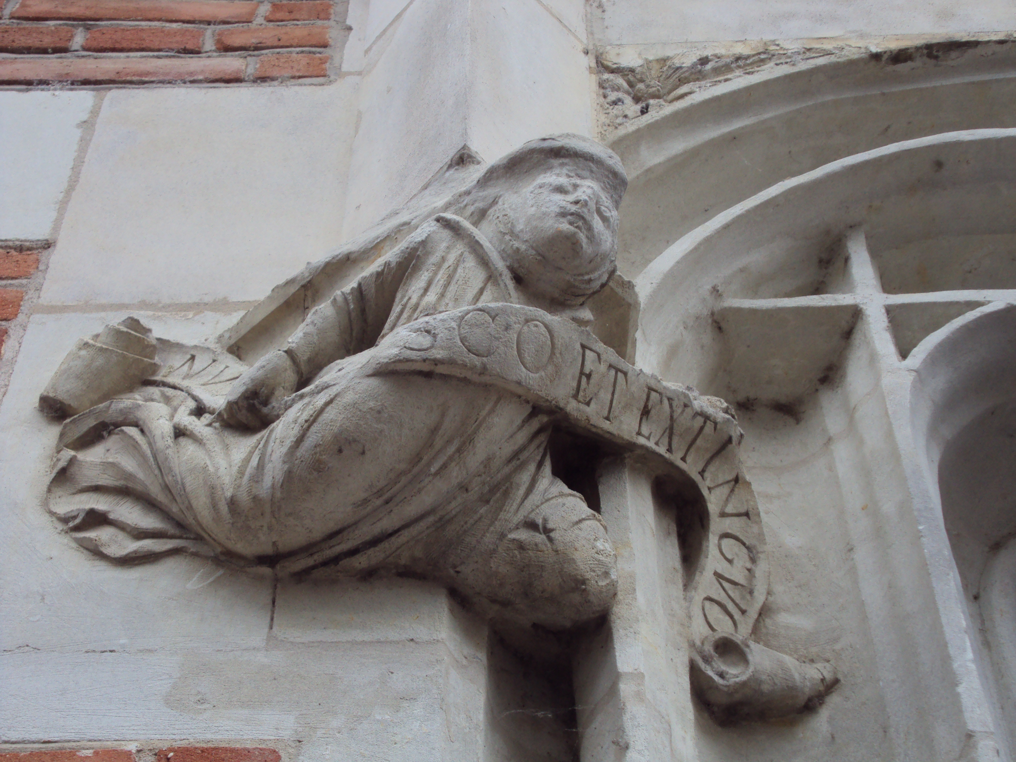 Détail hôtel d'Alluye. Sur le phylactère apparaît la devise (latine) de François Ier : "nutrisco et extinguo" qui signifie "je me nourris [du bon feu] et j'éteins [le mauvais]").